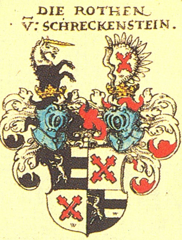 Ritterschaft und Adel in Schwaben Die Roth von Schreckenstein